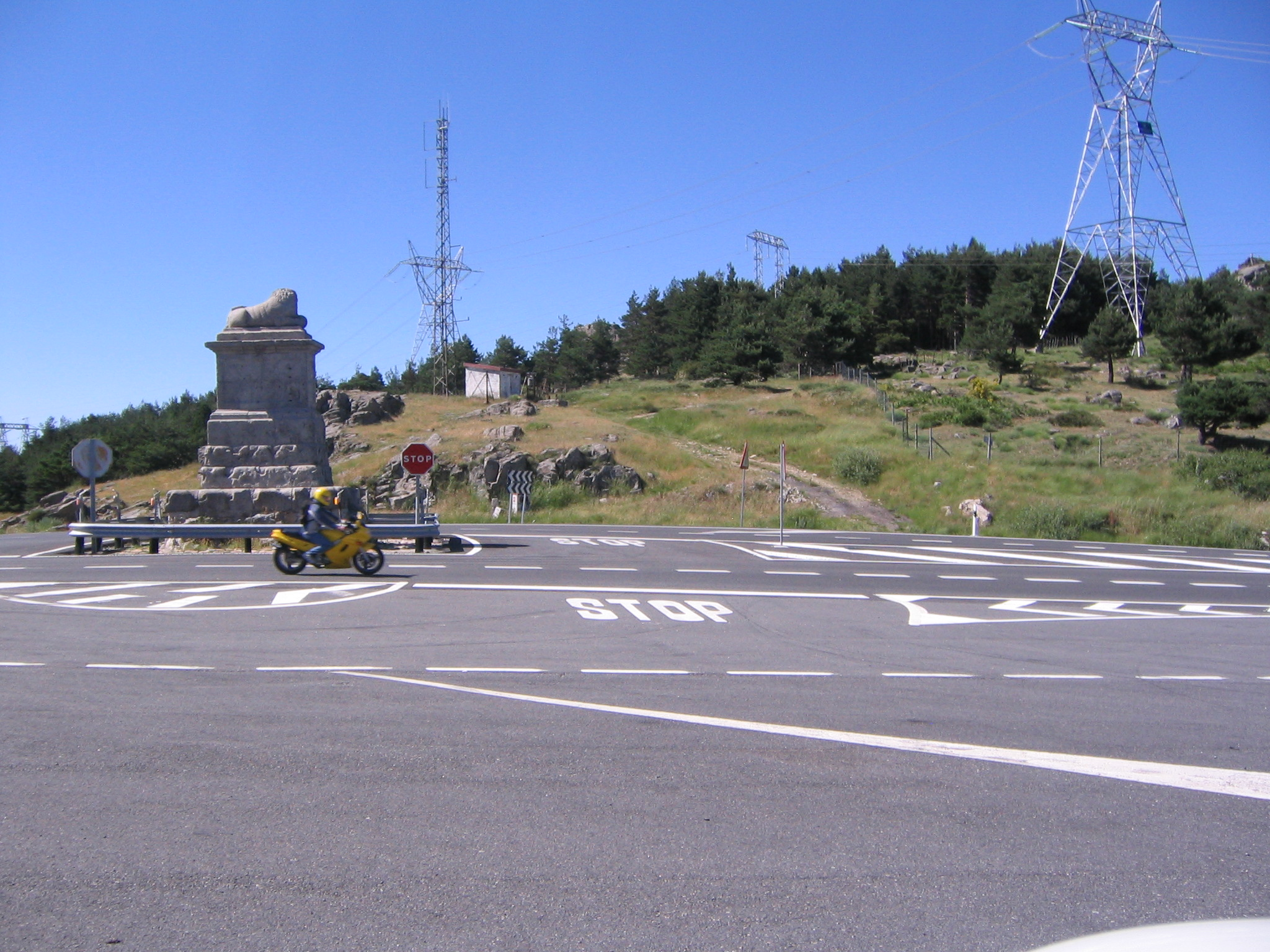 Alto del León, puerto del León o de los Leones, o puerto de Guadarrama. Sistema Central, España